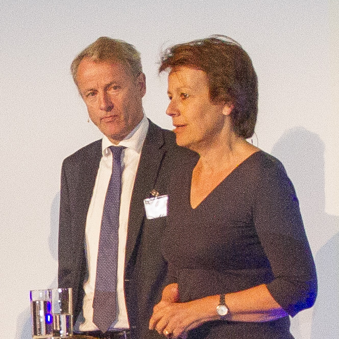 Hovedsesjon "Integrert og fornybar"